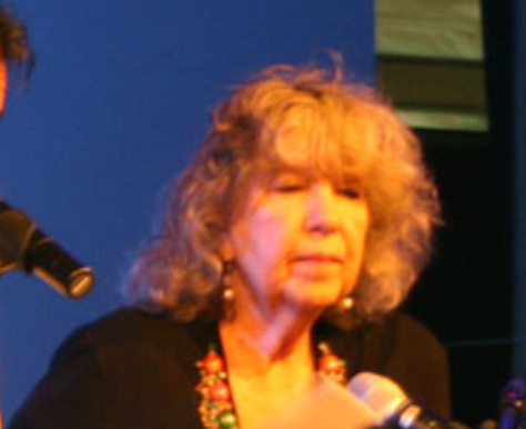 portretuitsnede van foto genomen op de Tong Tong Fair 2011 te Den Haag.